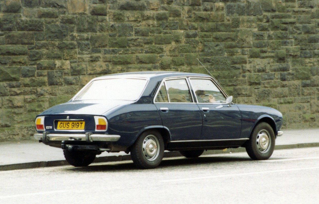 Peugeot 504 saloon (seen in Edinburgh)